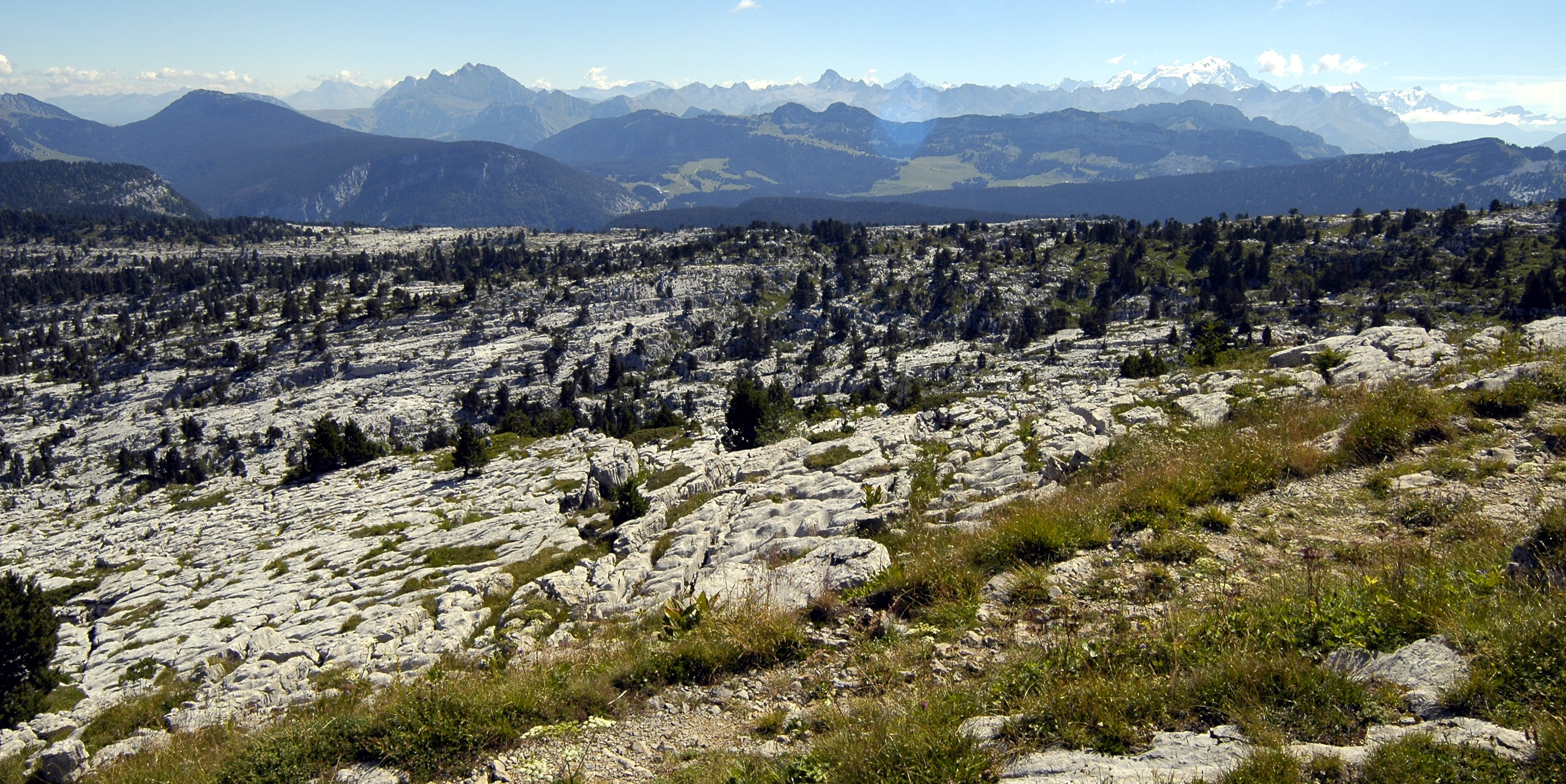 Le relief du plateau du Parmelan est constitué de roches calcaires ciselées par les eaux de pluies (en patois, un lapiaz). En fond, le Mont Blanc.